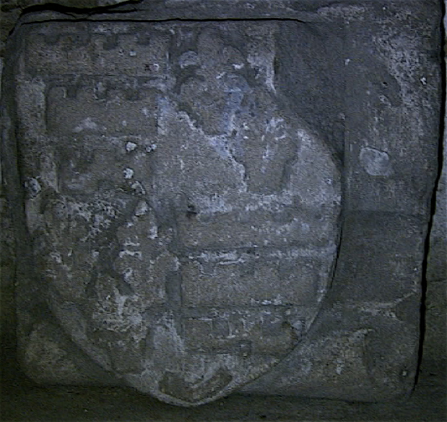 Blason taillé dans la pierre représentant les armoiries de Gabrielle de la Romiguière de Pomayrols (d'azur à trois fleurs de lys d'or soutenues de trois rocs d'échiquier d'argent), écartelées avec celles de Bérard Murat de Lestang (d'azur, à 3 fasces d'argent, crénelées, maçonnées de sable, la 1re de 5 créneaux, la 2e de 4, la 3e de 3, cette dernière ouverte de sable). Pomayrols-Aveyron-France.